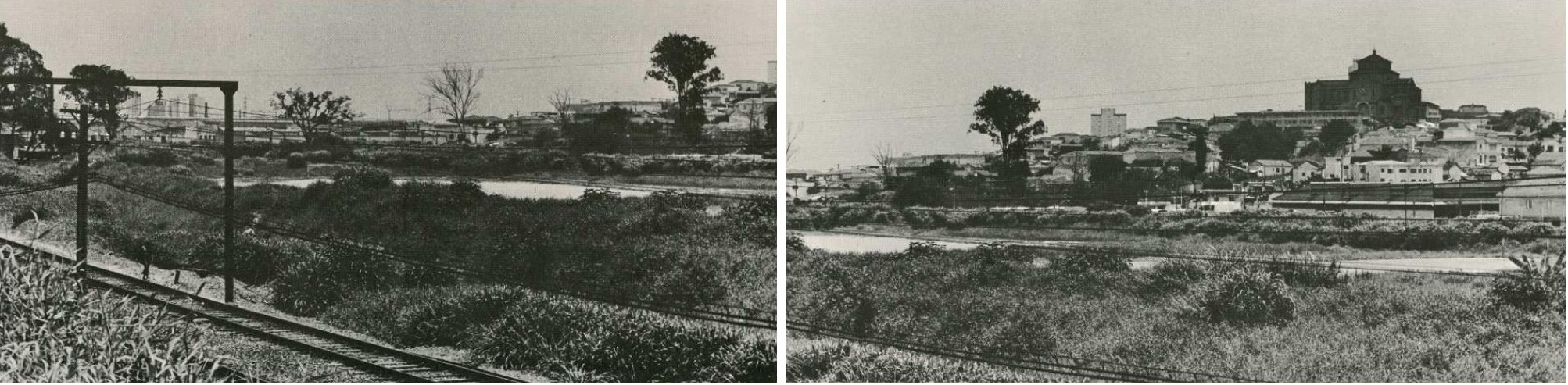 Área inóspita da futura Estação Penha. Desapropriada desde 4 de março de 1977, suas obras somente foram iniciadas em meados de 1982. no alto do morro vê-se a Igreja de Nossa Senhora da Penha de França.